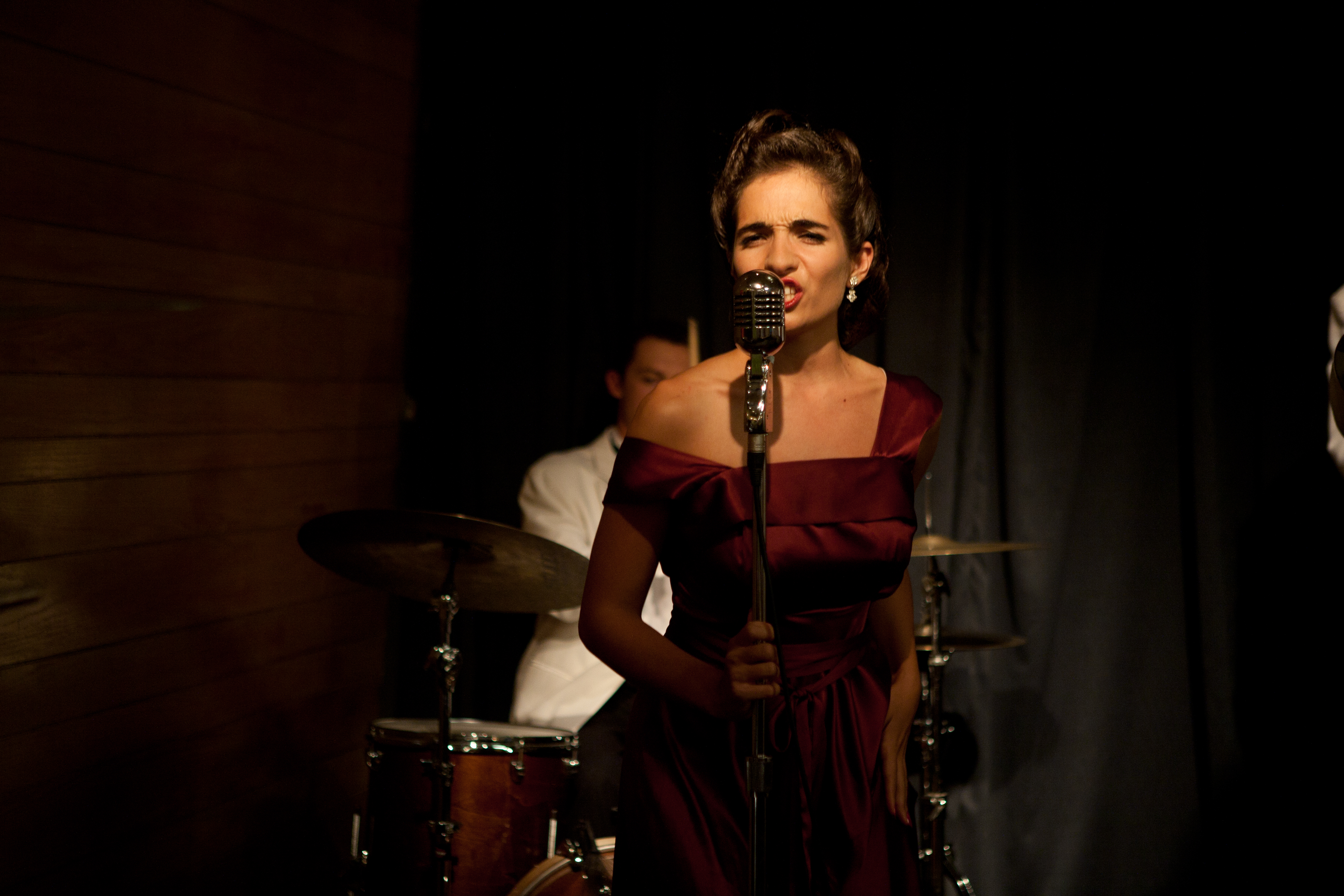 רותם זיסמן כהן בסרטה של דינה צבי ריקליס ברקיע החמישי